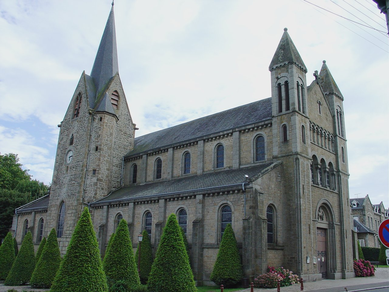 Église Saint-Martin de Condé-sur-Noireau (Calvados, France).